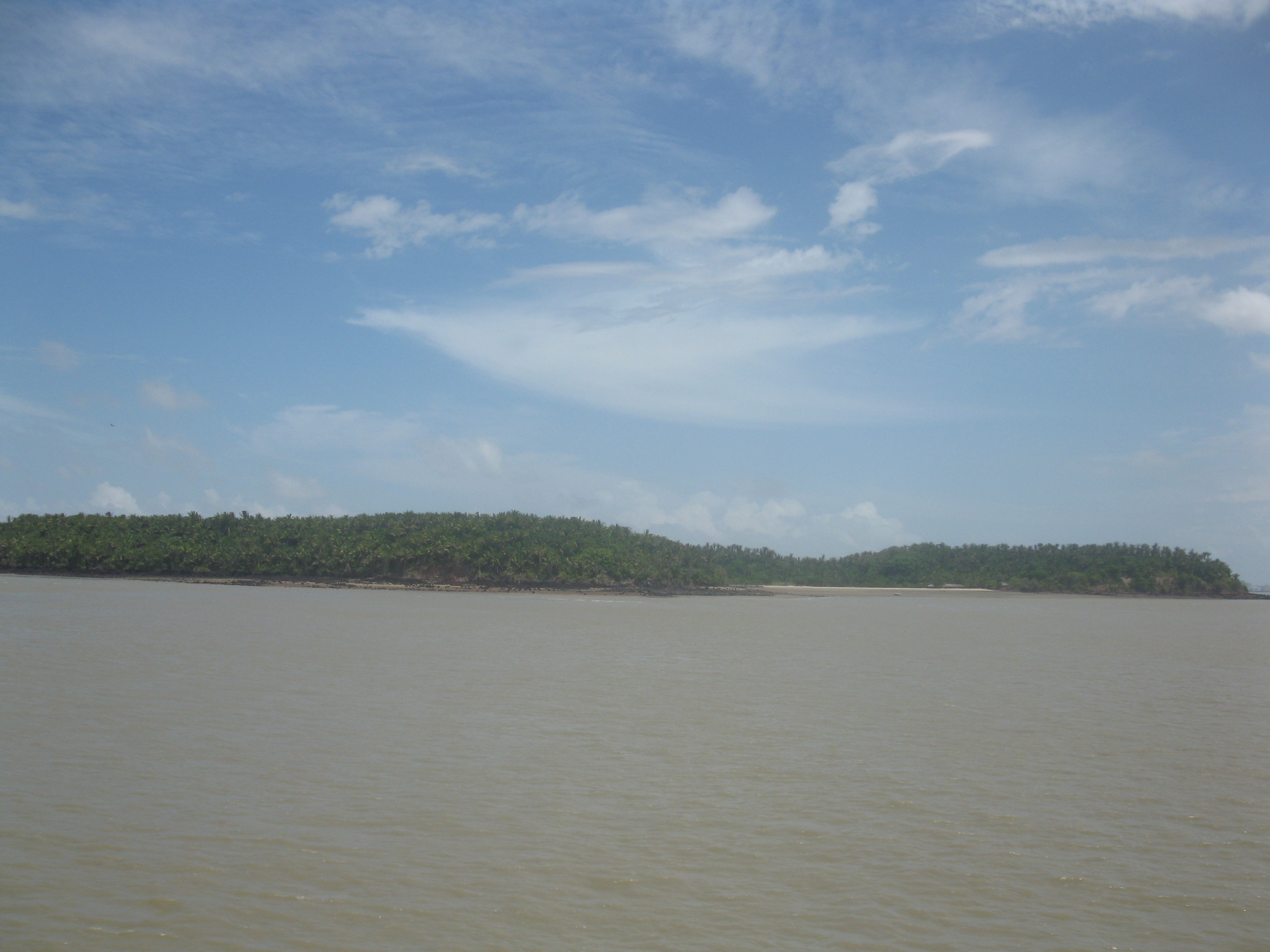 Ilha do Medo, localizada na Baía de São Marcos, Maranhão.